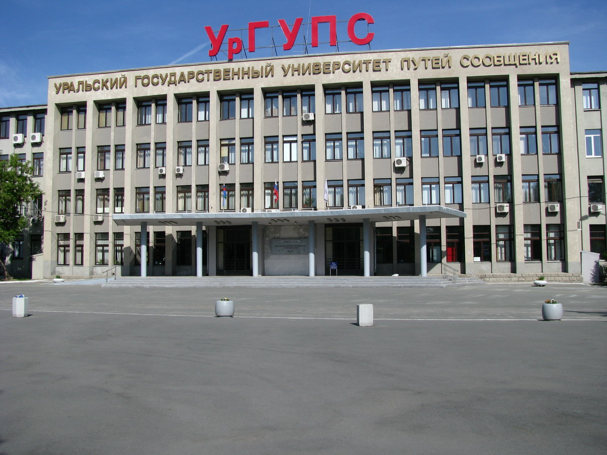 Вход в главный корпус Уральского государственного университета путей сообщения (г.Екатеринбург).